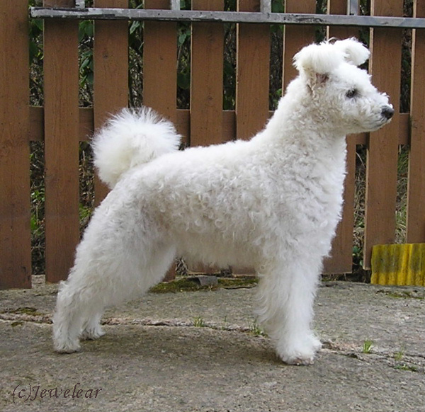 Pumi female, Jewelear Betula Lupulina